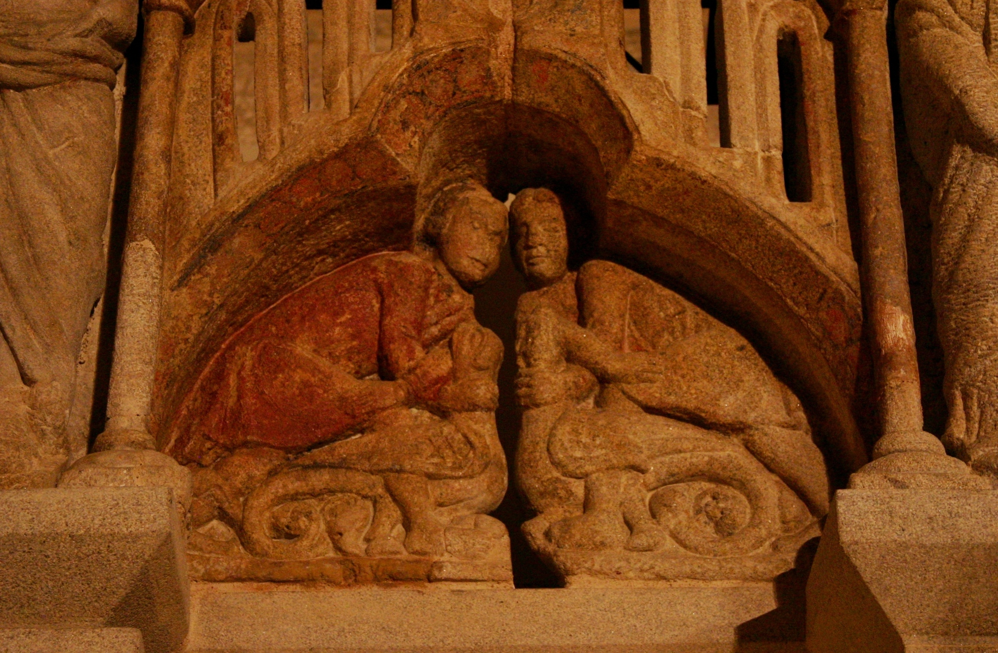 Detalhe do coro em pedra do mestre Mateo